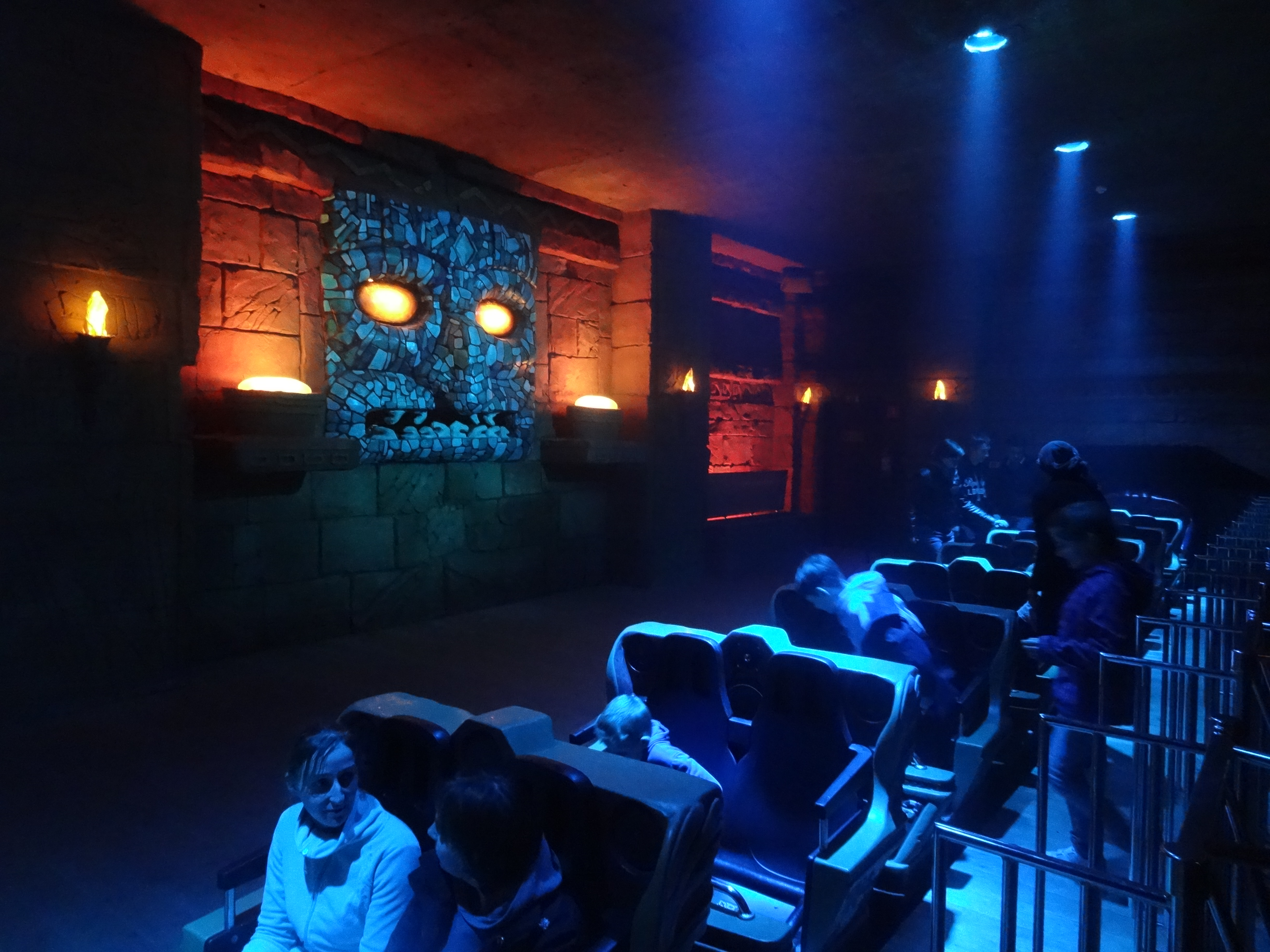 Gare d'Huracan à Bellewaerde.